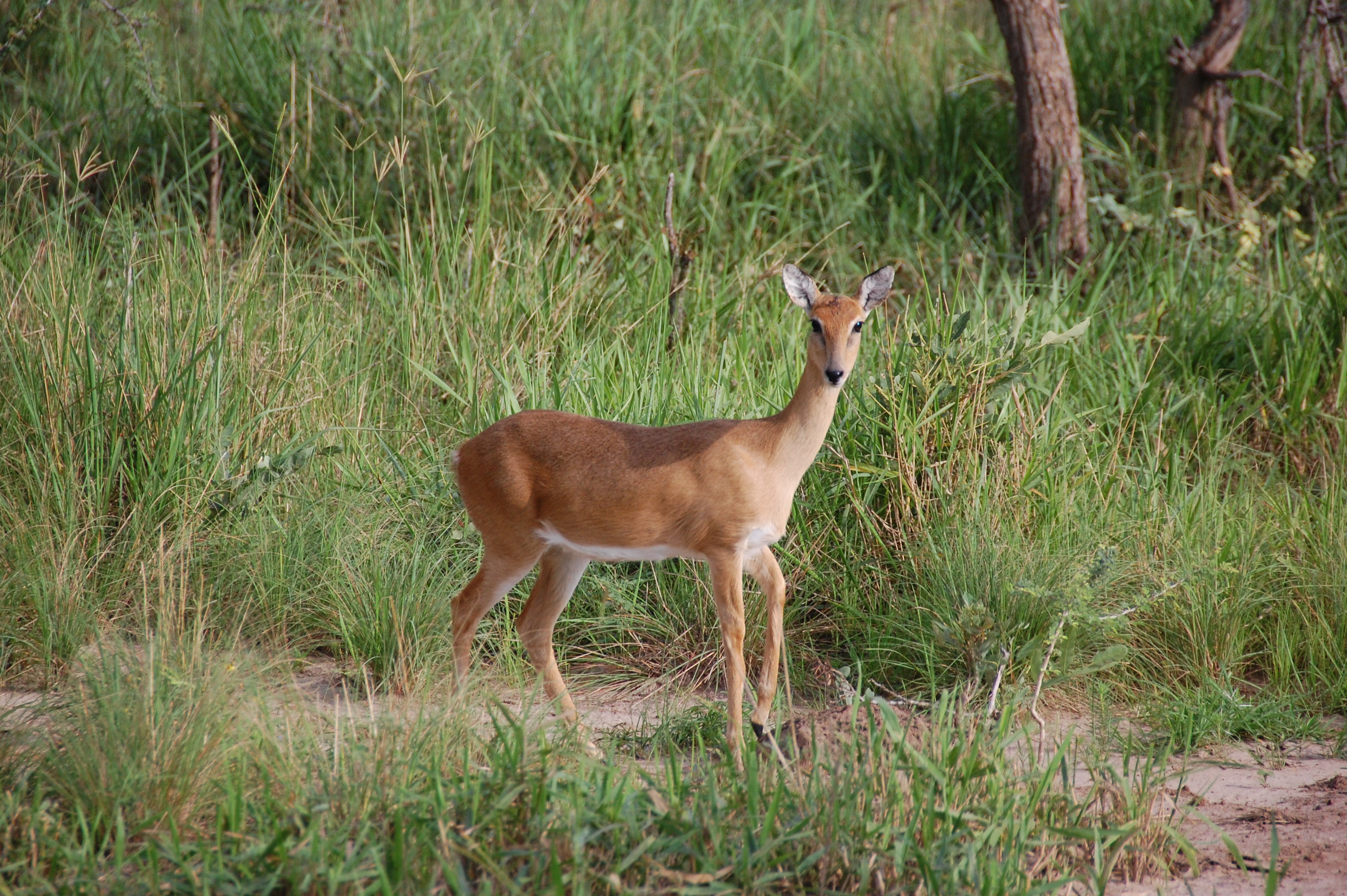 Oribi